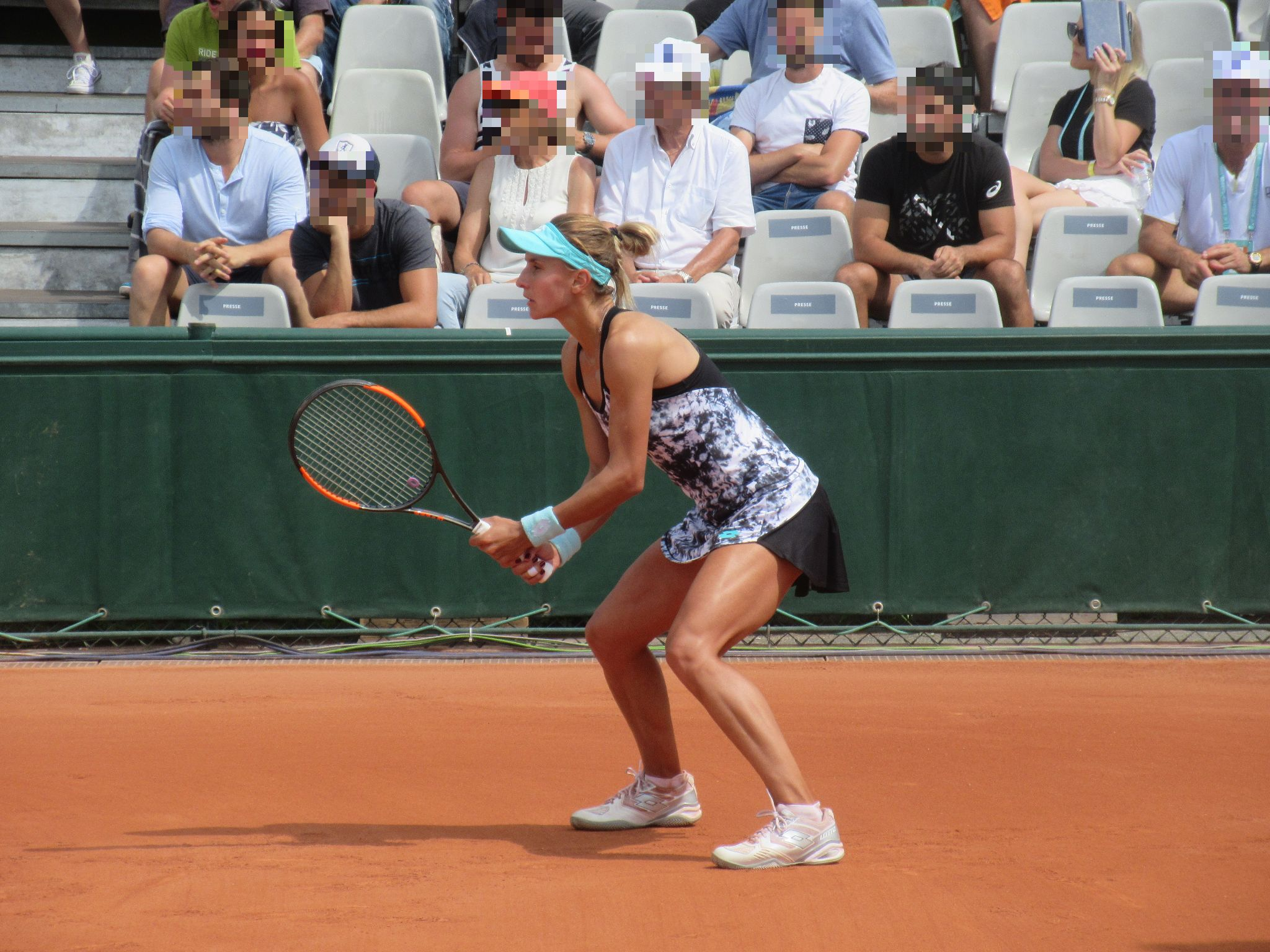 Lesia Tsurenko à Roland-Garros en 2018